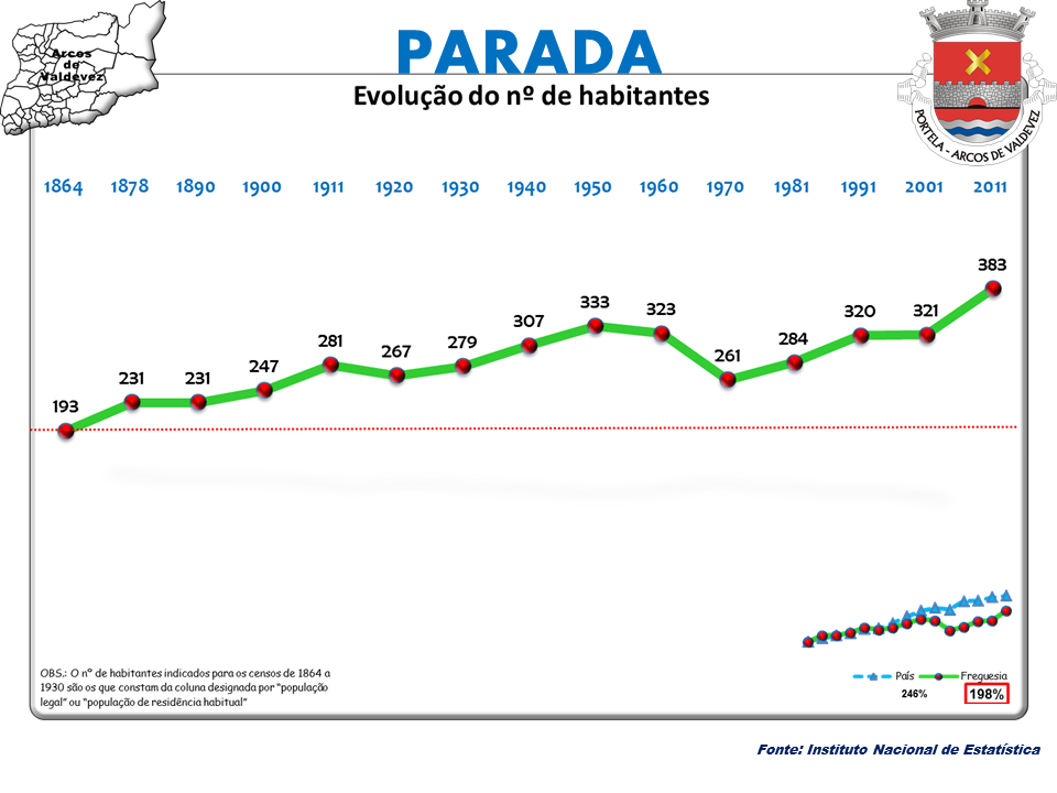 Censos 1864/2011